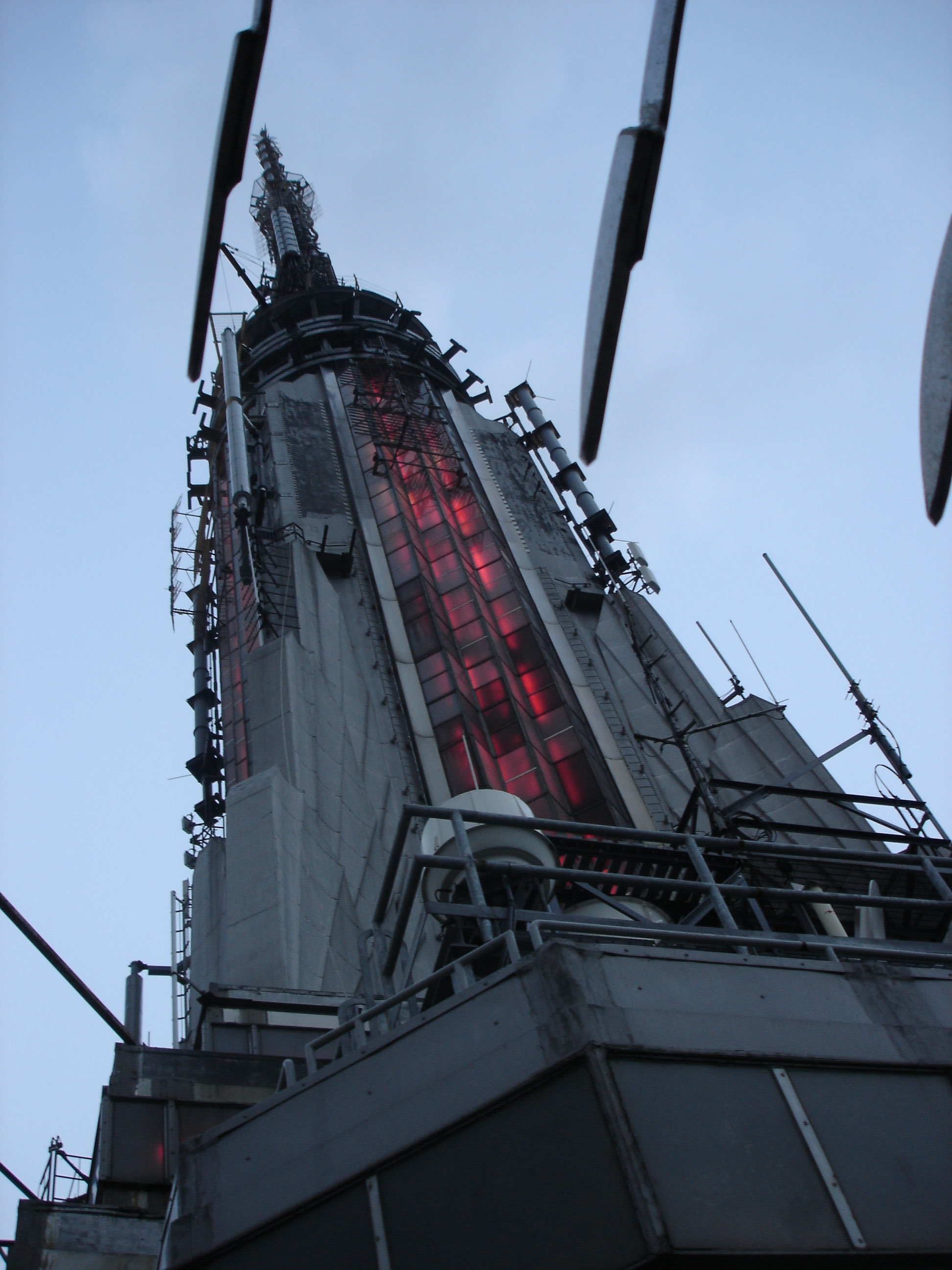 Antenne des Empire State Buildings von der Aussichtsplattform aus fotografiert